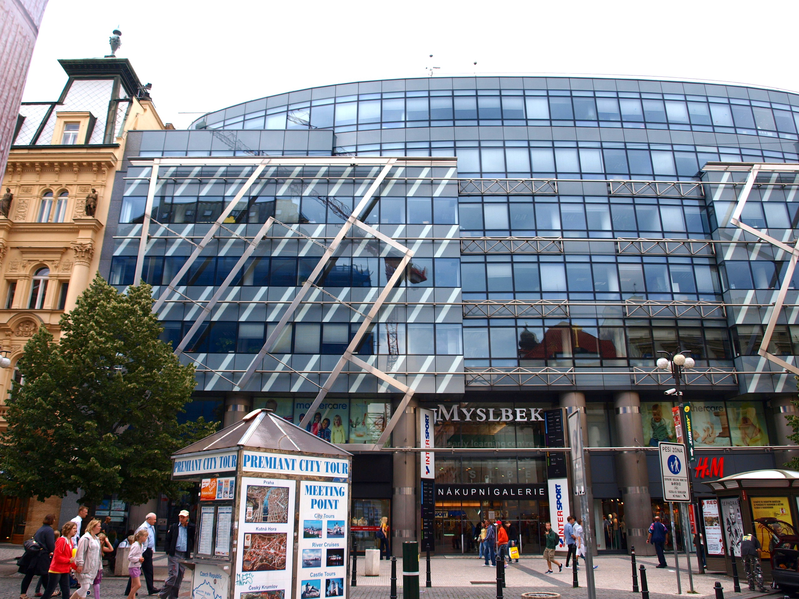 Palác Myslbek, Praha